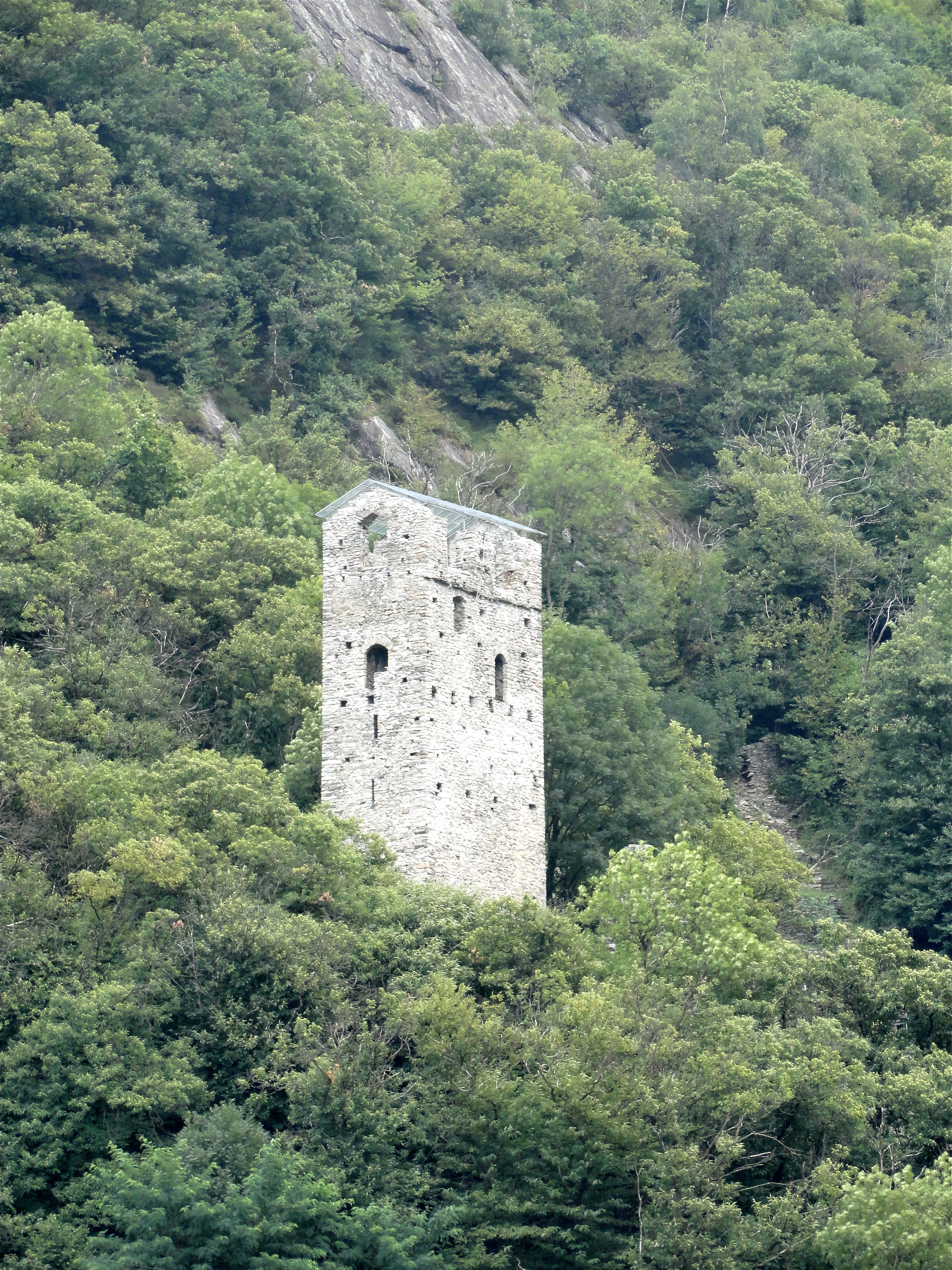 Torre Palas